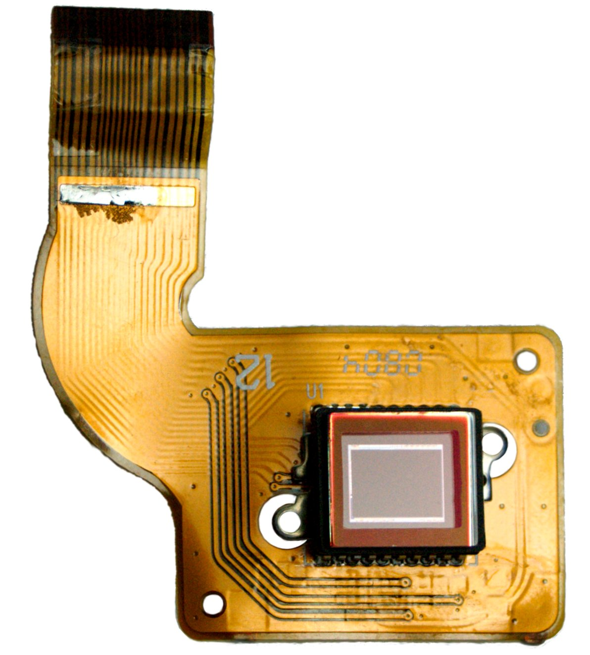 CCD Sensor used inside a consumer-digicam